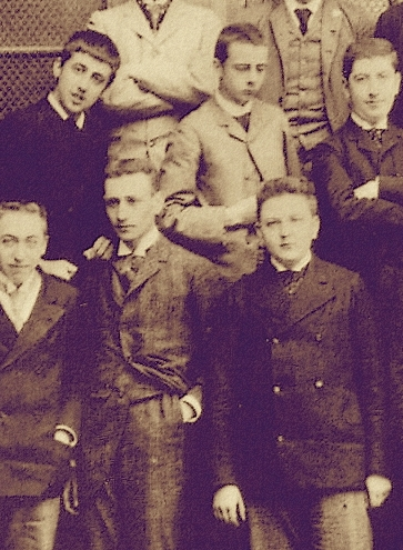 Détail de la photo de la classe d'Alphose Darlu au lycée Condorcet 1888. A droite premier plan David David-Weill, en haut à gauche, Marcel Proust.